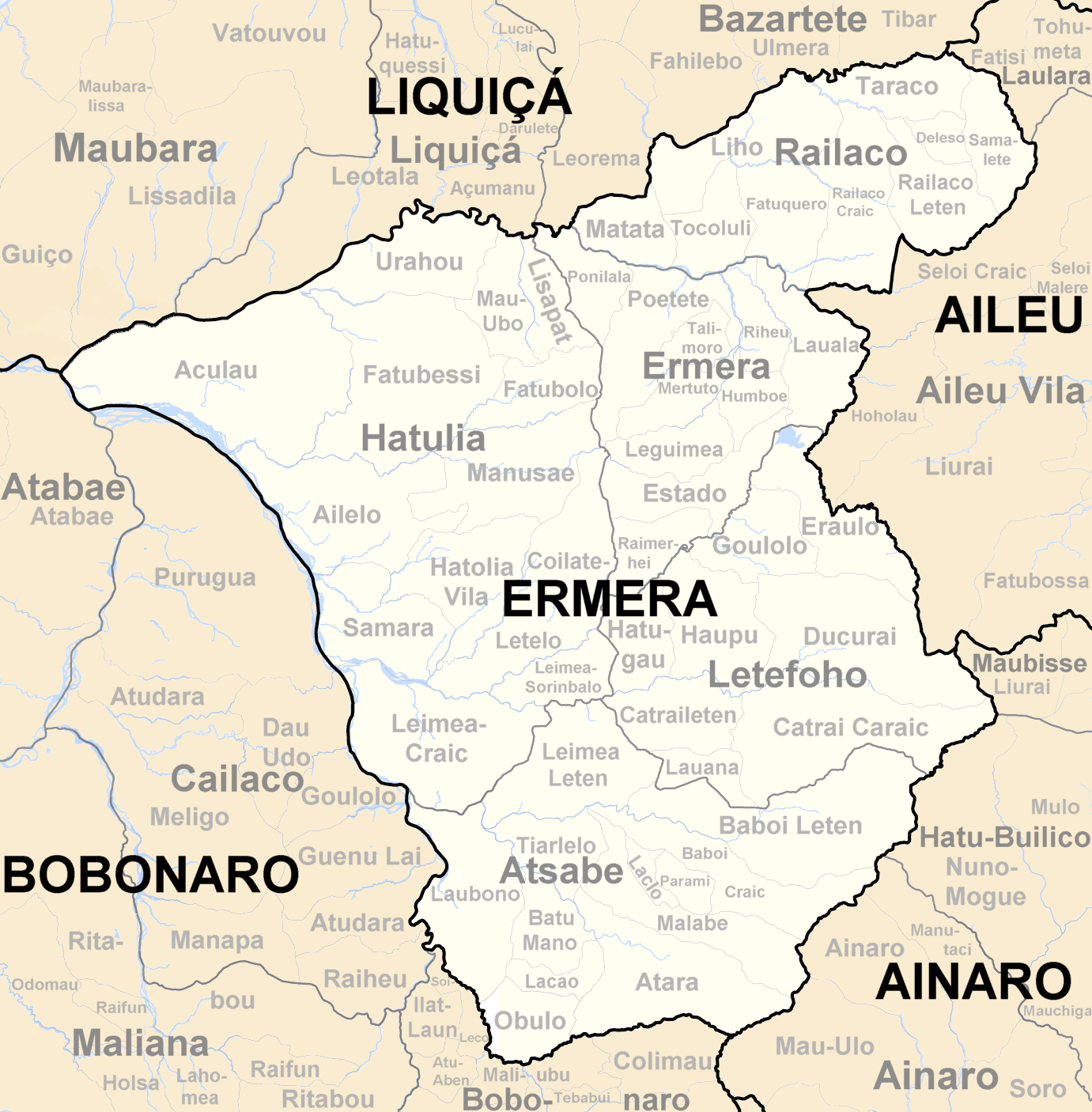 Sucos des Distrikts Ermera/Osttimor nach der Neustrukturierung 2004